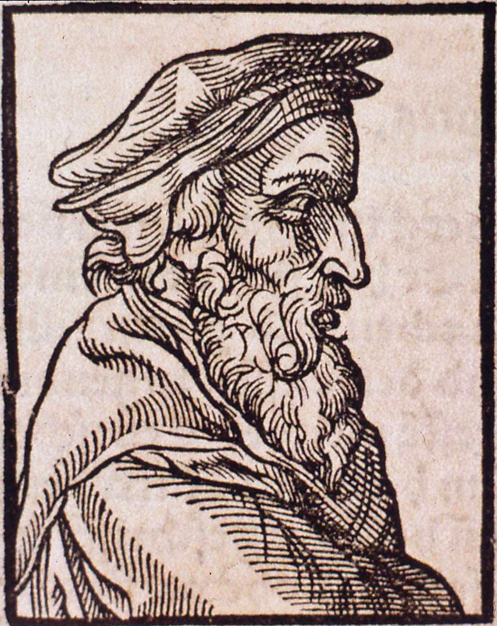 Pétrus Dasipodius Professer zu Strassburg, Buste, profil à dr. Bibliothèque nationale et universitaire de Strasbourg